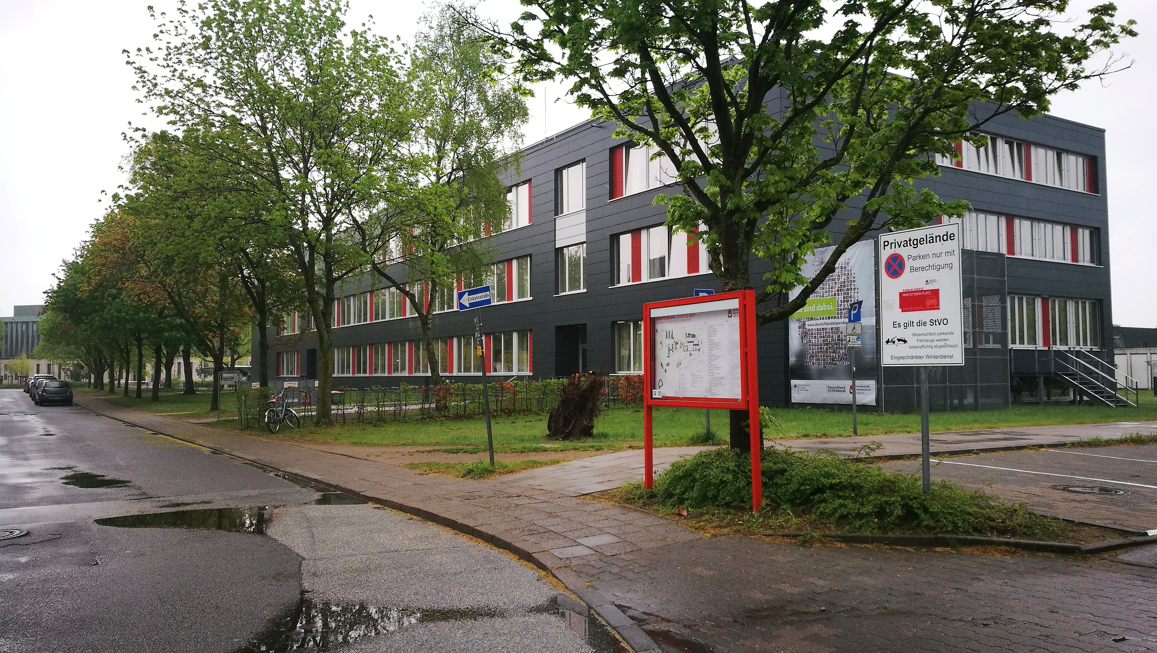 TH Lübeck / Gebäude des Fachbereiches Bauwesen